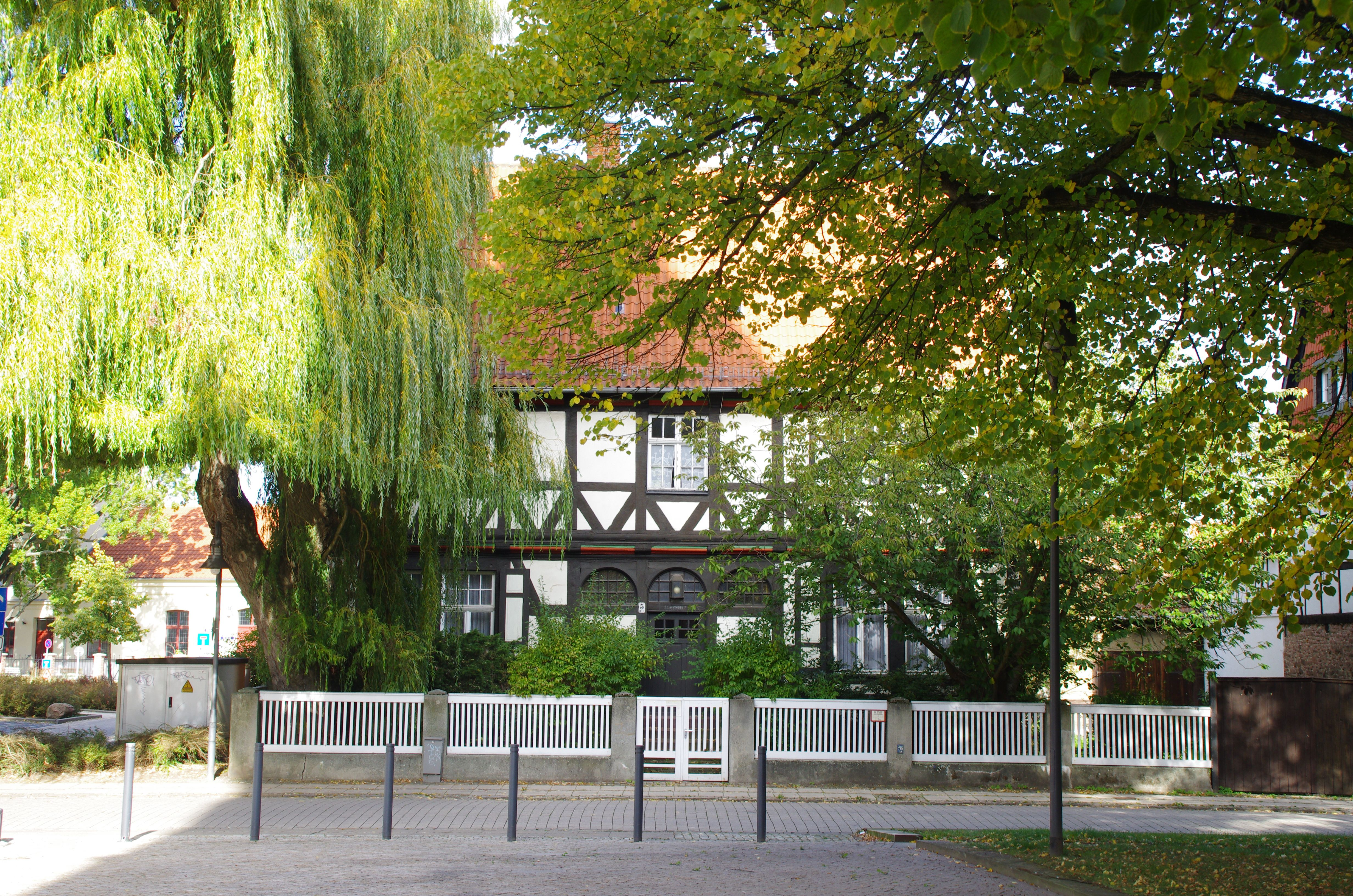 Haldensleben in Sachsen-Anhalt. Das Haus steht unter Denkmalschutz.